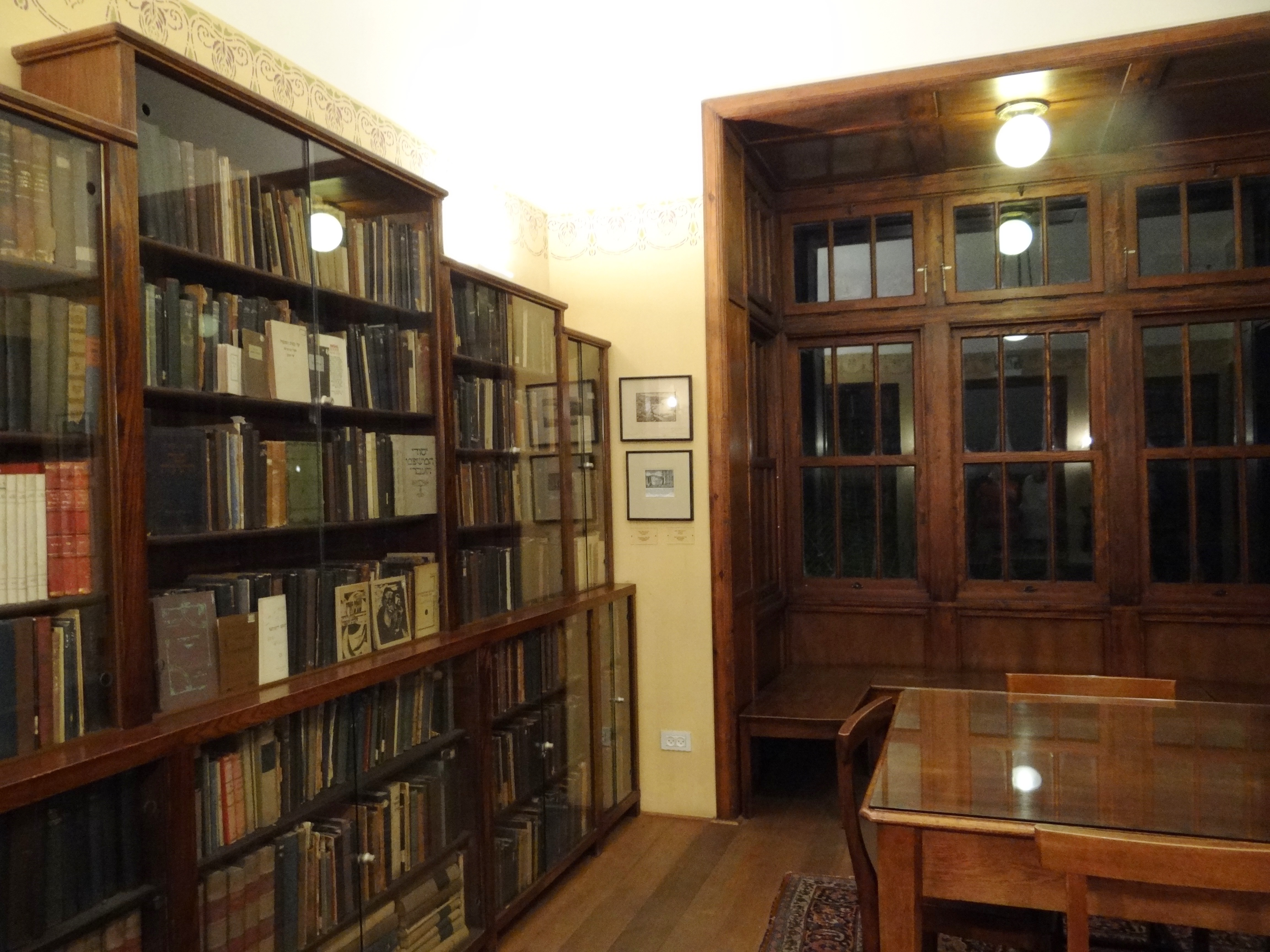 בית ביאליק הוא ביתו של המשורר הלאומי חיים נחמן ביאליק, בסמוך לבית העירייה הישן. הבית נבנה על מגרש שמימן ביאליק באמצעות הכנסות ממהדורה מיוחדת של כתביו. הבית שנחנך בשנת 1925, נבנה בסגנון האקלקטי בתכנון האדריכל יוסף מינור. בית ביאליק מבפנים